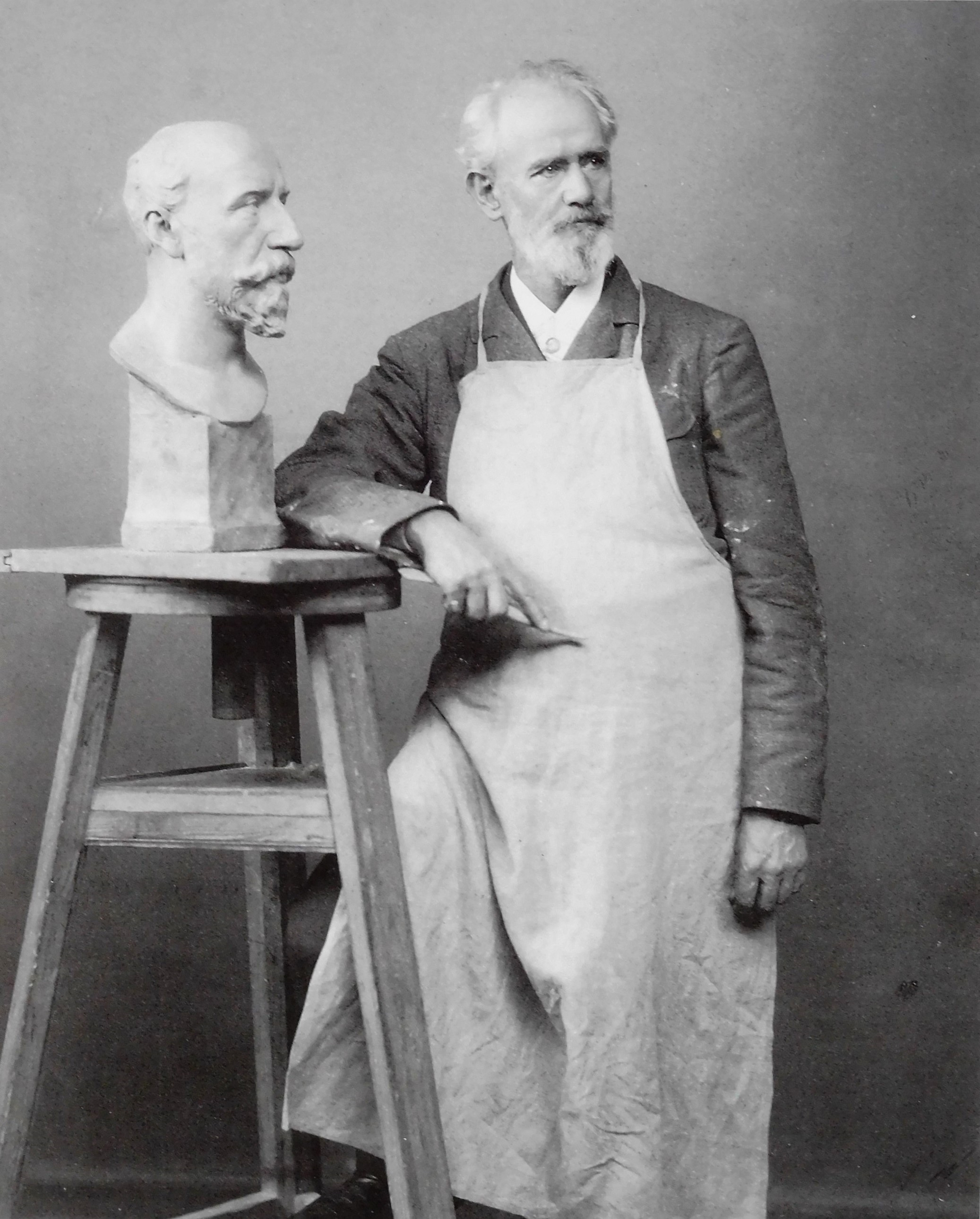 Fotografie des Bildhauers Friedrich Reusch